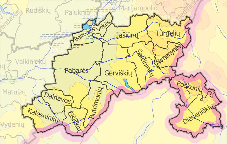 Padaryta iš :image:LietuvosSeniunijos.png